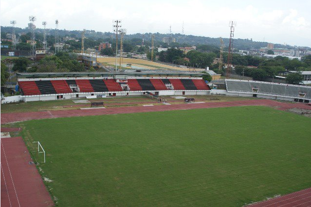 Estadio José Antonio Paez